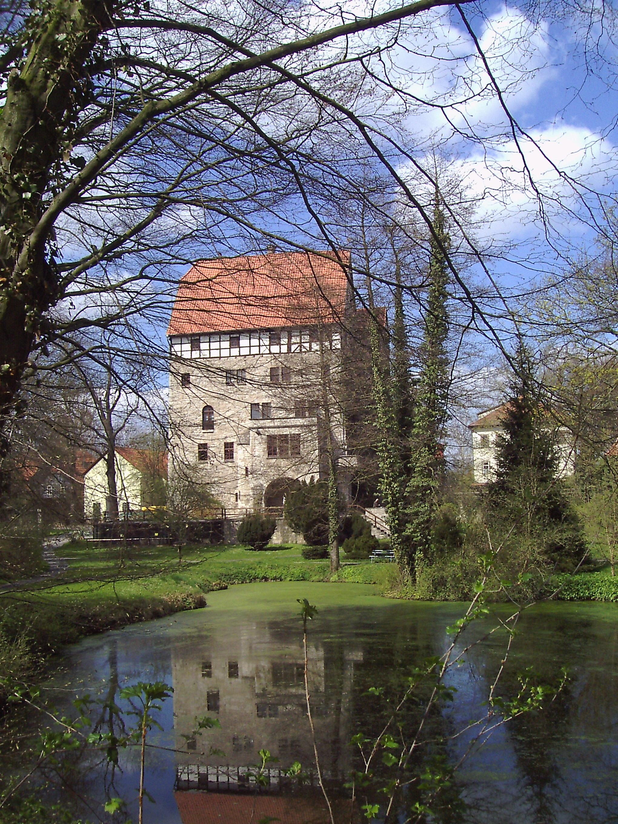 Das Wasserschloss der Familie von Berlepsch und ein Ausschnitt des seit 1877 angelegten Parks mit dem großen Parkteich. Der Park dient als Lebensraum frei lebender Vögel und zur Pflege kranker Vögel.